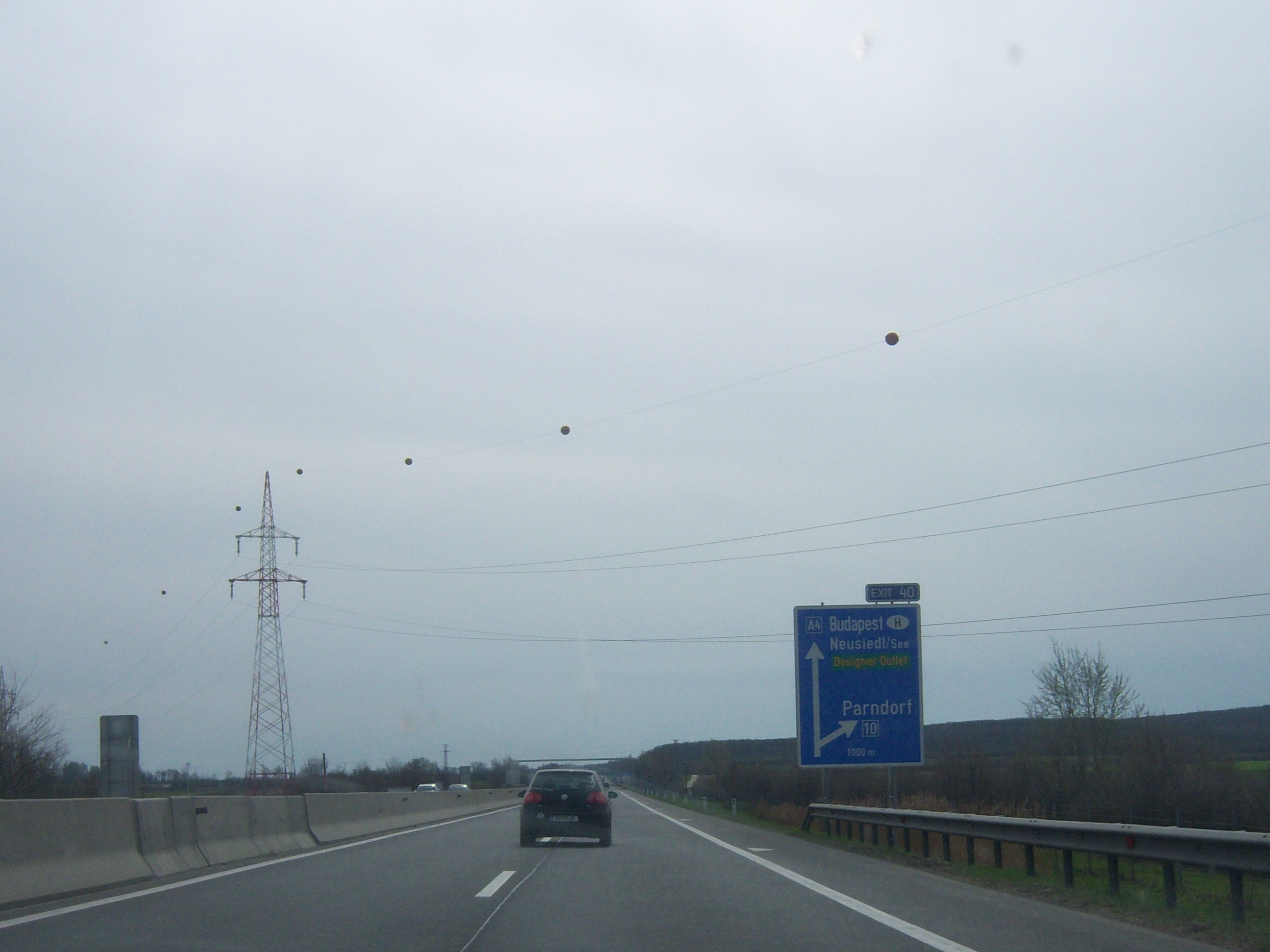 Ost Autobahn A4 im Bereich der Anschlussstelle Parndorf